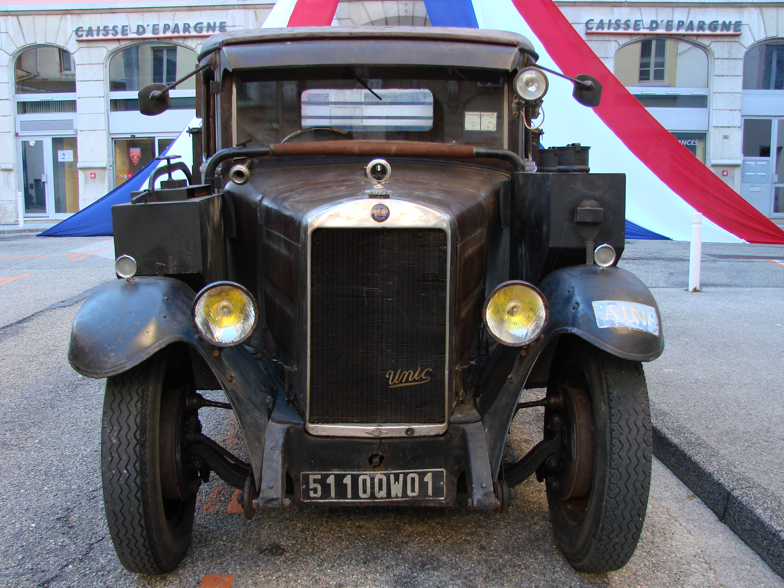 Camion Unic équipé d'un gazogène à la cérémonie du 70e anniversaire du défilé du 11 novembre 1943 à Oyonnax